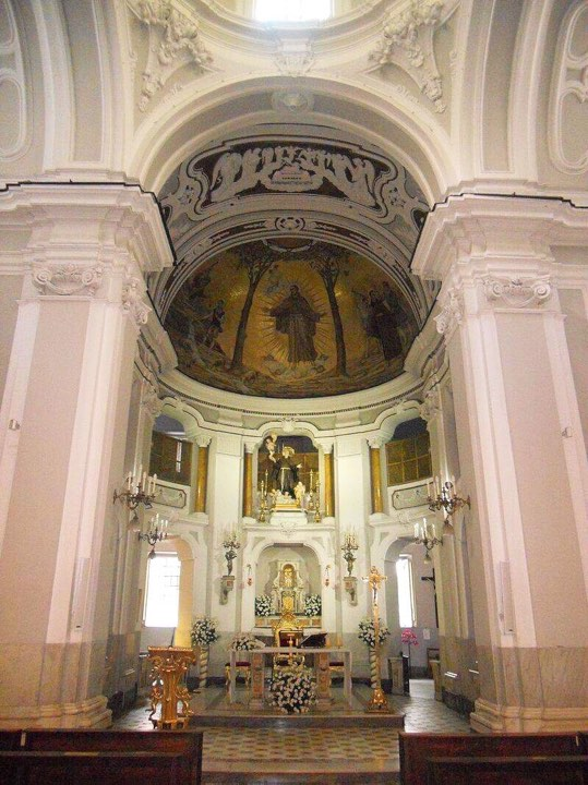 Abside S. Pasquale a Chiaia, Napoli